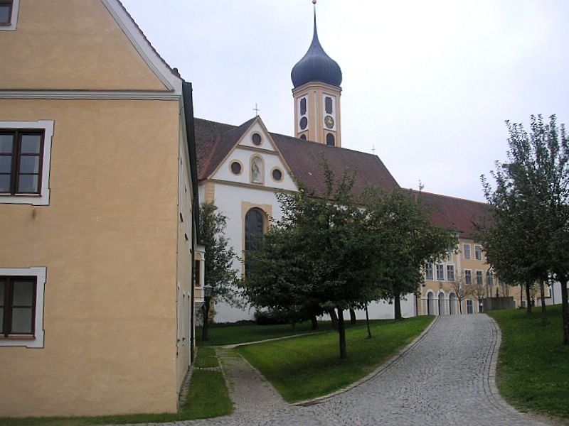 Kloster Oberschönenfeld bei Augsburg (Bayerisch-Schwaben). Blick zur Kirche. Eigene Aufnahme, Sept. 2006 / Oberschoenenfeld Monastery near Augsburg (Bavaria, Germany). The church. Own photo, Sept. 2006